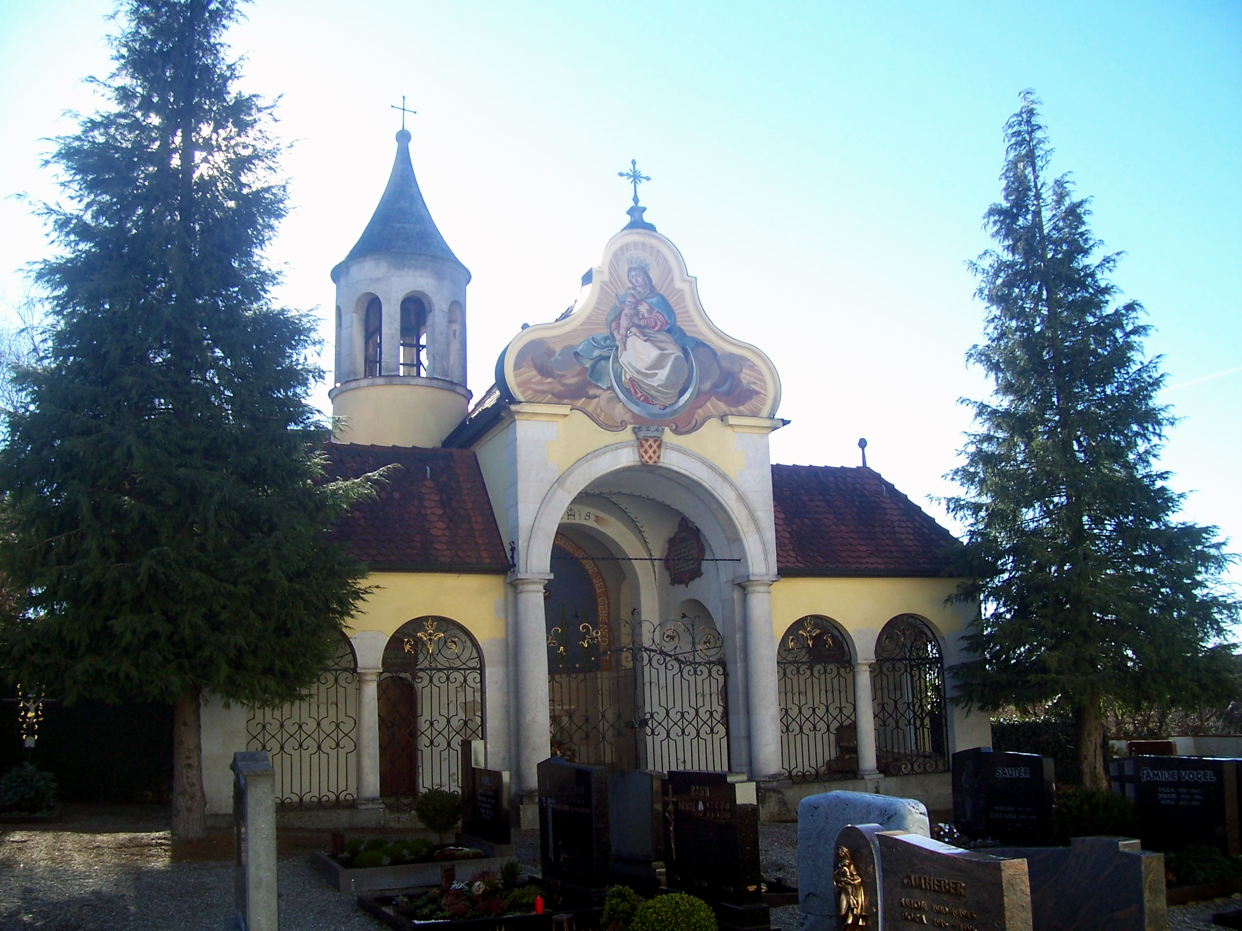 Mausoleum der Grafen Moy des Sons, Obenhausen